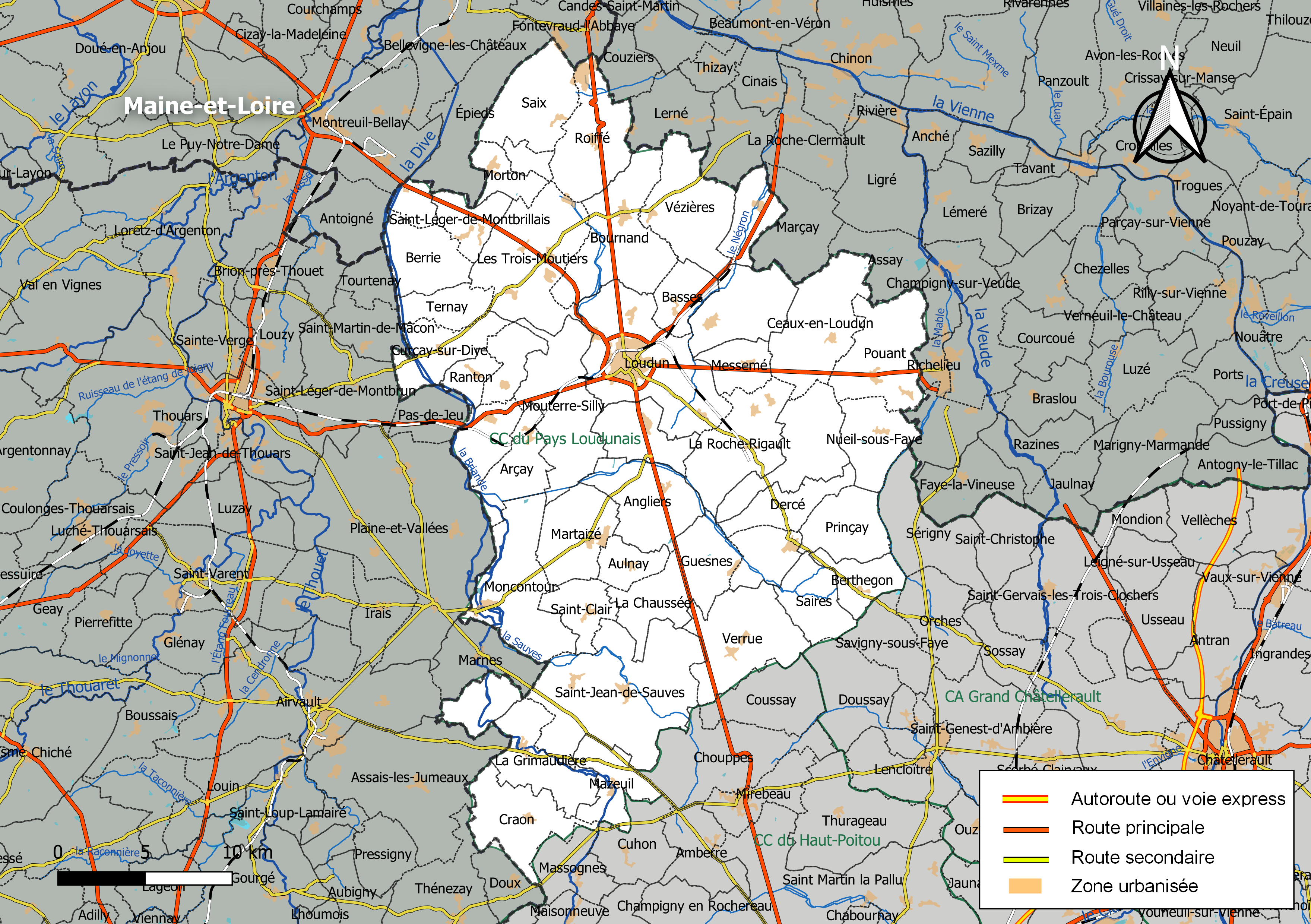 Carte géographique de la Communauté de communes du Pays loudunais, département de la Vienne, France. Composition au 1er janvier 2019.